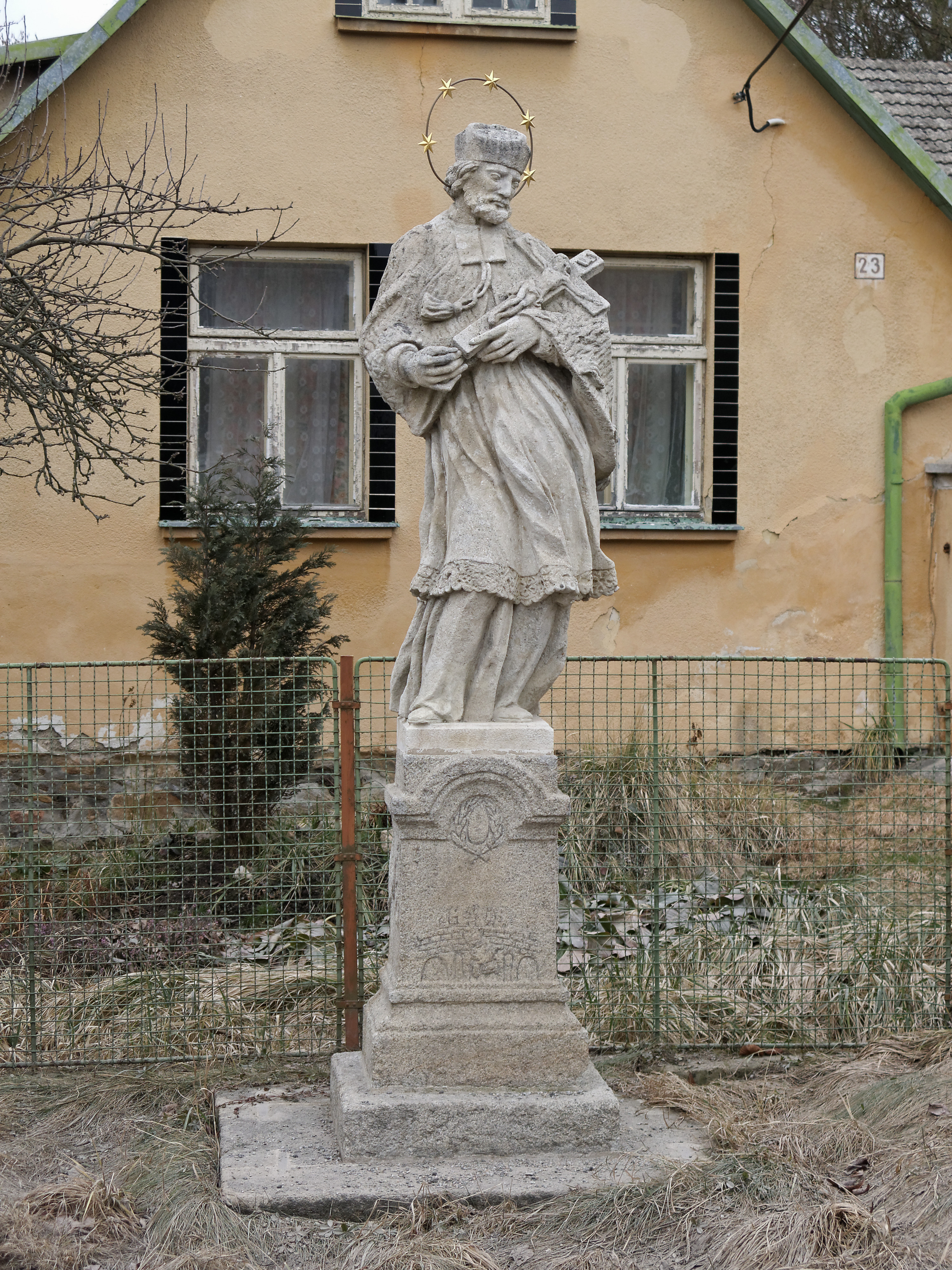 Socha sv. Jana Nepomuckého (Salavice), u mlýna, Salavice